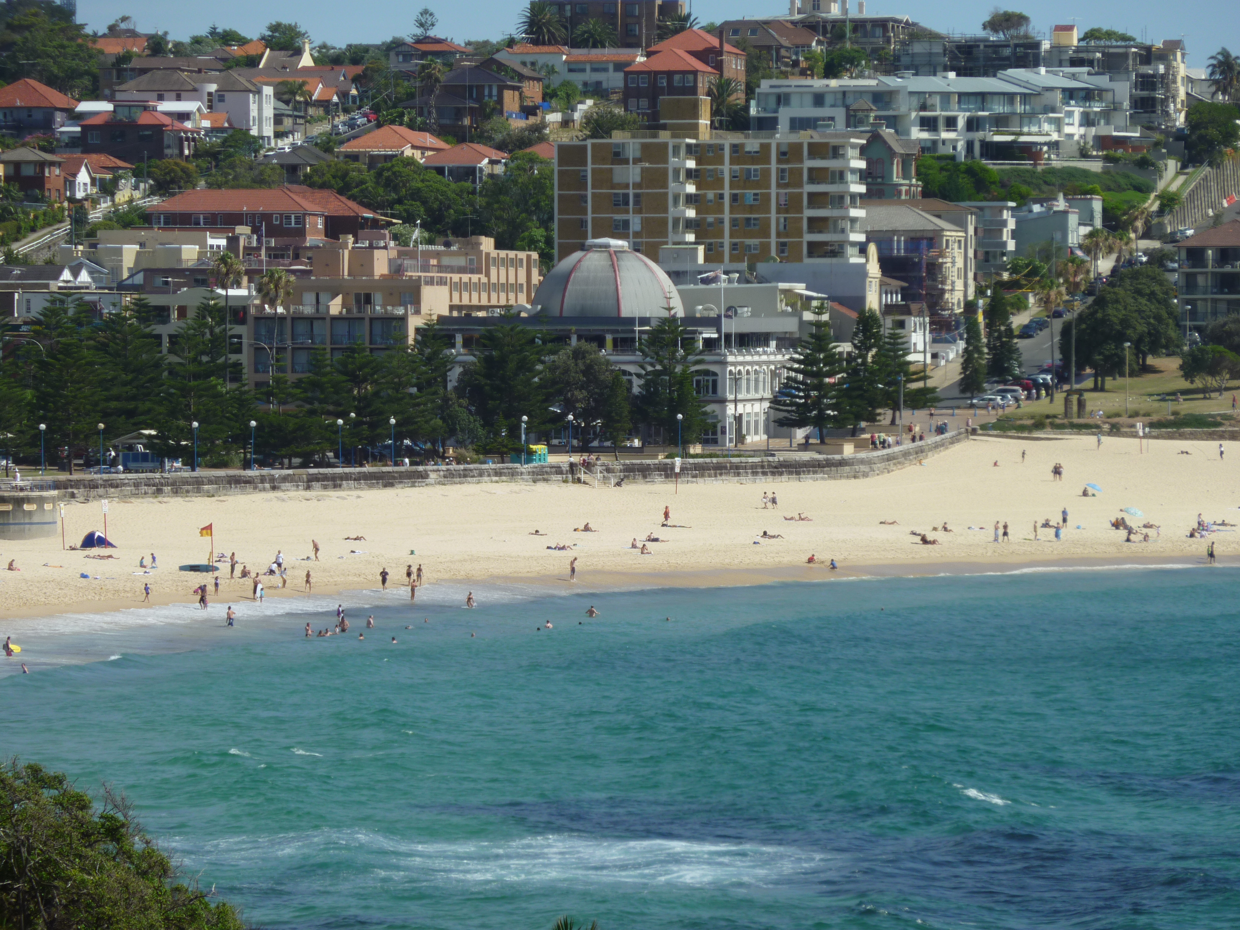 Coogee Beach (Sydney) with old Acquarium